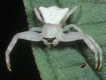 female Thomisus kitamurai from Okinawa.